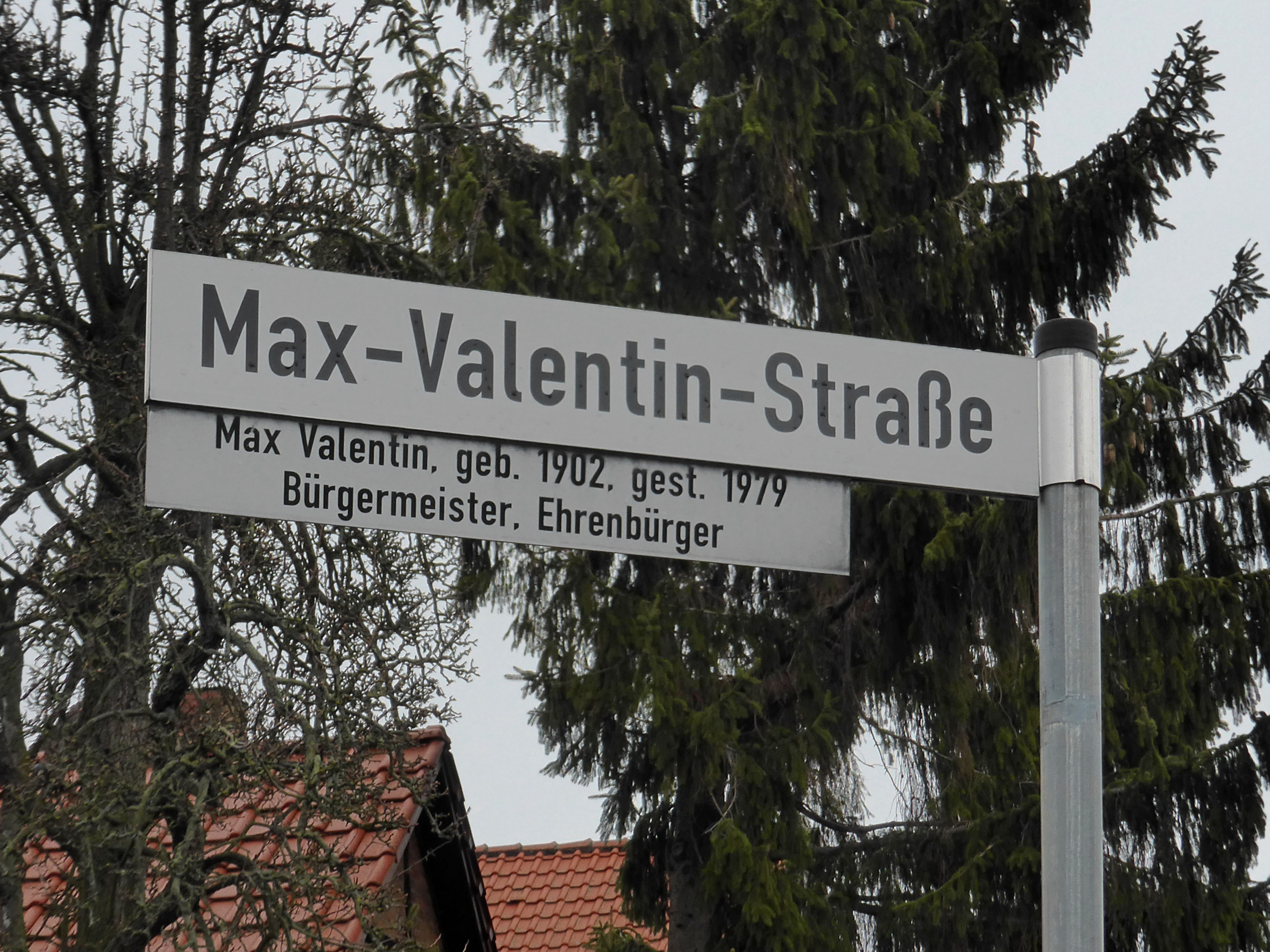 Straßenschild in Vorsfelde.